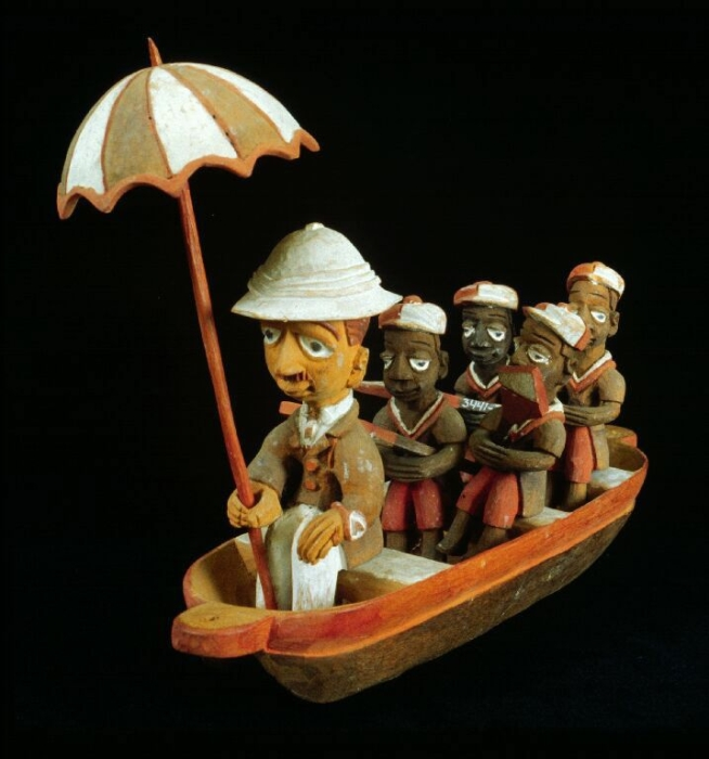 De miniatuurvoorstelling is een ietwat vriendelijke karikatuur van dé Europeaan in de tropen. In de roeiboot zitten een Europeaan (zendeling?) gewapend met tropenhelm en parasol. De boot wordt voortgepeddeld door vier inheemse roeiers, één peddel ontbreekt. Een ongeveer identiek exemplaar staat afgebeeld in Plant Armstrong (1971: 30). Deze stelt voor: een districtsofficier in een boot met roeiers door Thomas Ona, Yoruba. Meer bijzonderheden werden niet vermeld. De Yoruba is het meest urbane Afrikaanse volk. Al vanaf de 11e eeuw was hun eerste stad, Ile-Ife, het centrum van een invloedrijke stadstaat, en gauw volgden andere stadstaten met bruisende centra. Deze ontwikkeling heeft zich tot de dag van vandaag voortgezet. De Yoruba cultuur heeft nauwe raakvlakken met die van de Fon in zuidelijk Benin en Togo. Hun politieke systemen en religieuze werelden zijn vrijwel identiek, en ook de kunsten van beide groepen tonen wederzijdse beïnvloeding. Veel van de objecten worden gebruikt in de religie en voor het onderschrijven van de leiderschapssystemen van het koninklijke hof en van de ouderengenootschappen, de Ogboni. Deze genootschappen, met zowel mannelijke als vrouwelijke leden, regeren samen met de koning. Ogboni moet machtsmisbruik door de koning voorkomen, fungeren als rechtbank en spelen een hoofdrol bij het kiezen, inaugureren maar ook begraven van koningen.